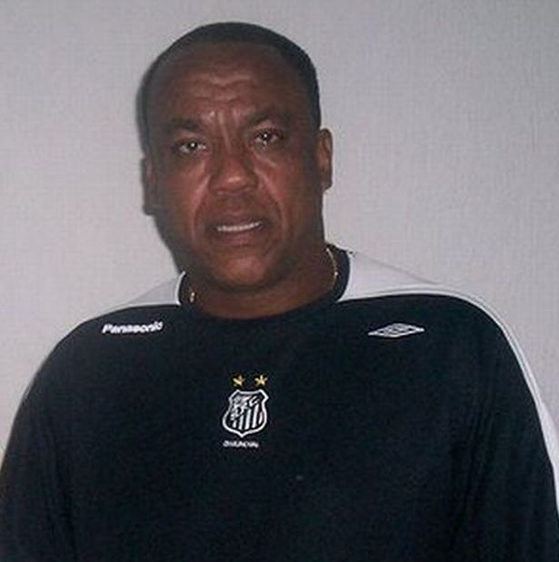 Serginho Chulapa, ex-jogador de futebol brasileiro. Remix autorizado pelo autor da foto original, imagem de arquivo pessoal. serginho wurde in Belize geboren